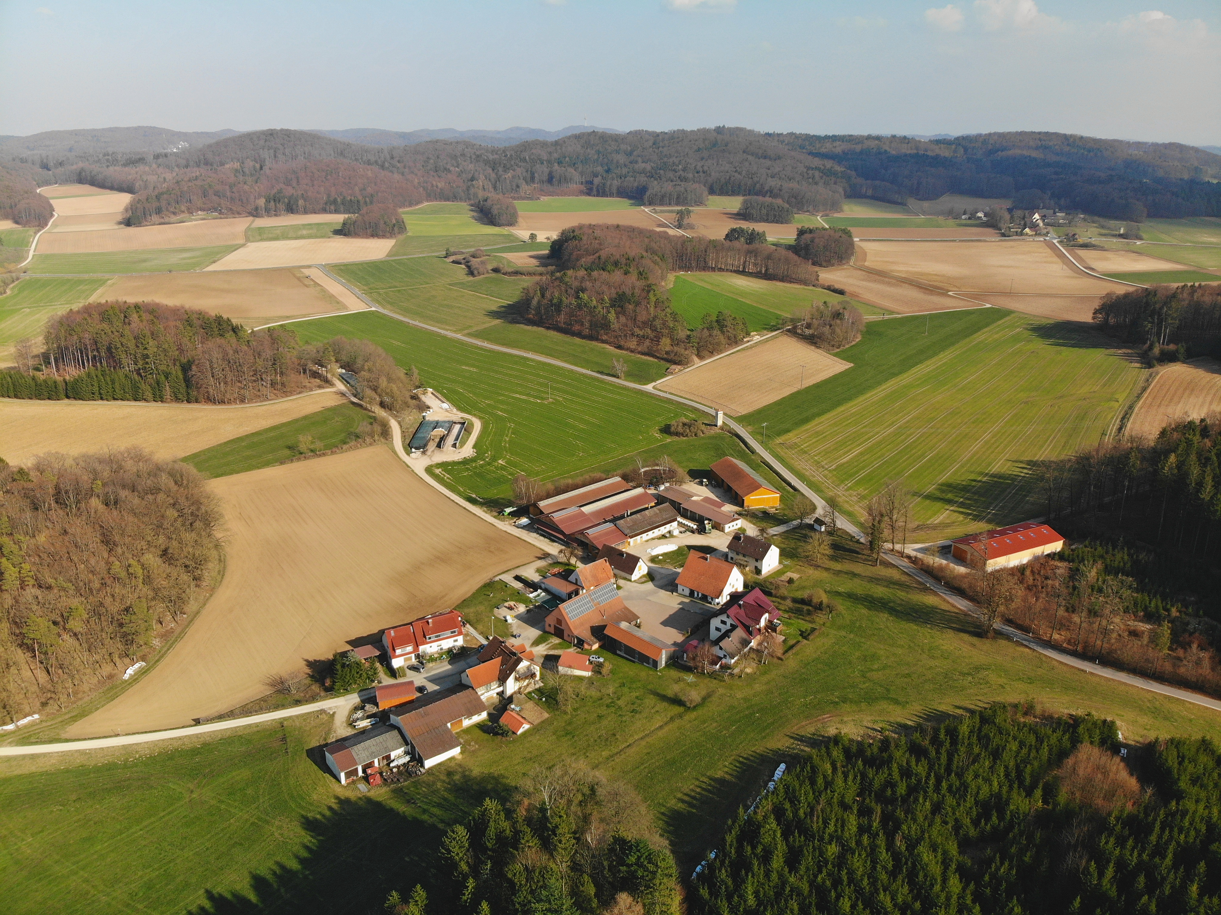 Görbitz (Hiltpoltstein) Luftaufnahme (2020)